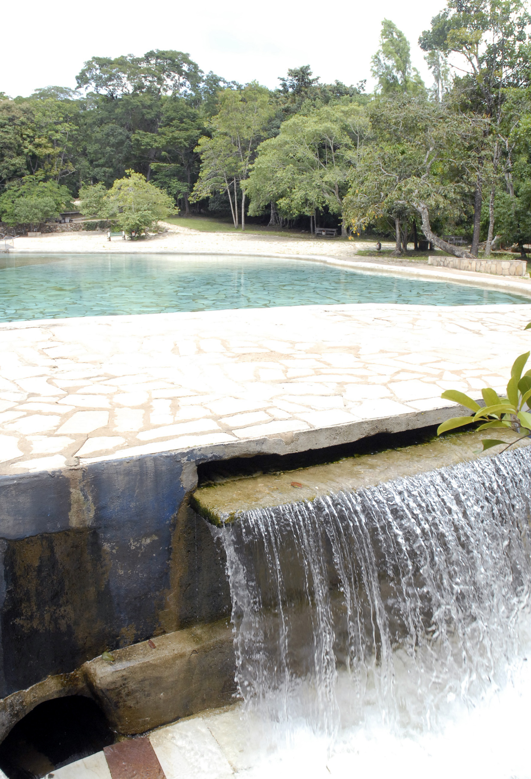 Piscina do Parque Nacional de Brasília